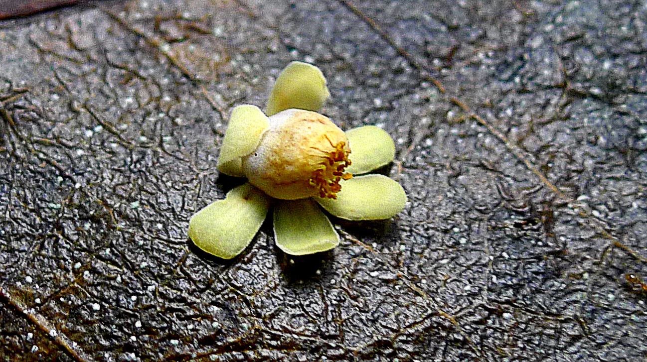 Cariniana legalis (Mart.) Kuntze